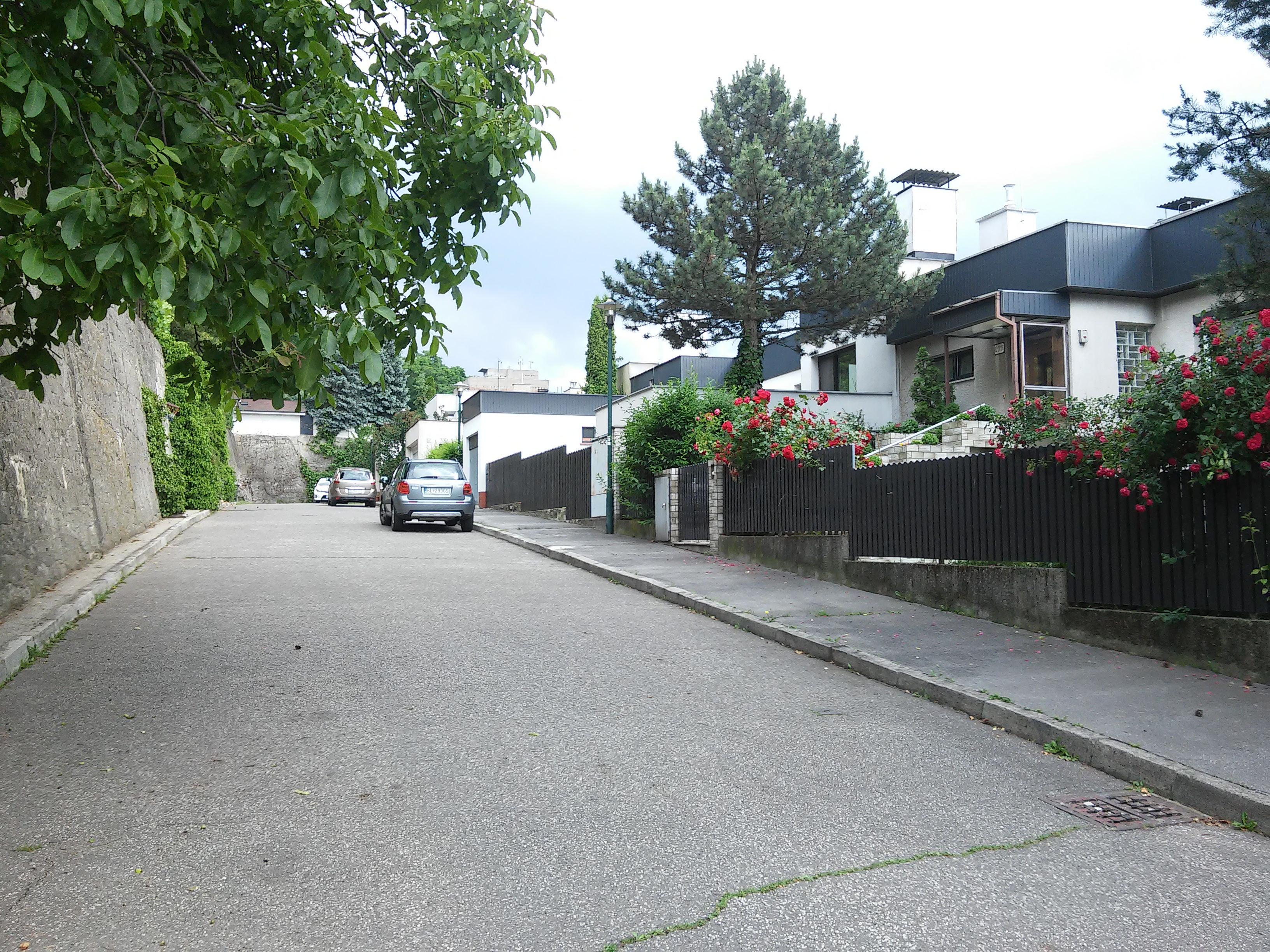 Havelkova, Lamač, Bratislava